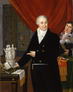 G. Manzoni, Ritratto del conte Luigi Tadini, 1813, Lovere, Accademia Tadini